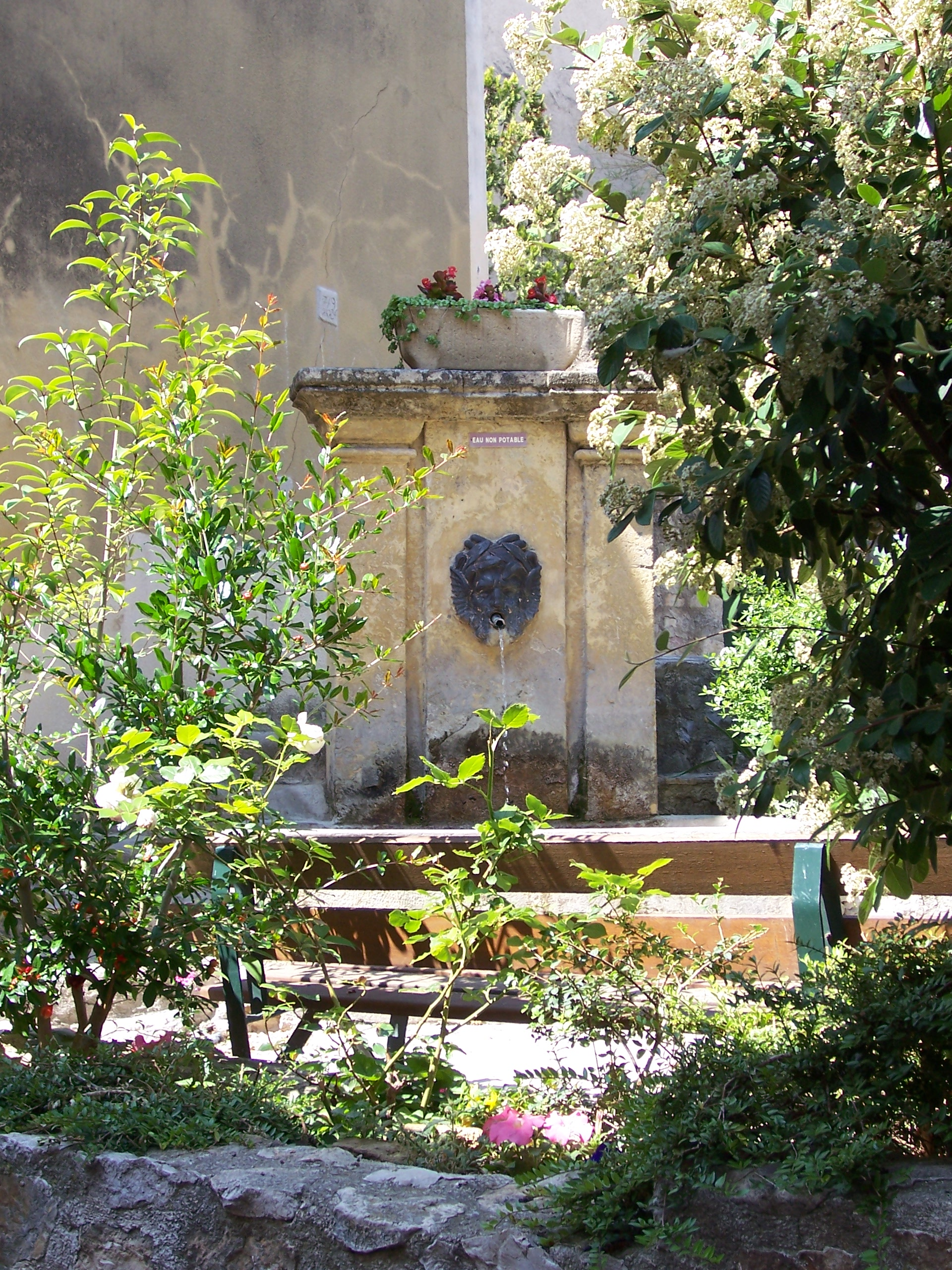 Fontaine